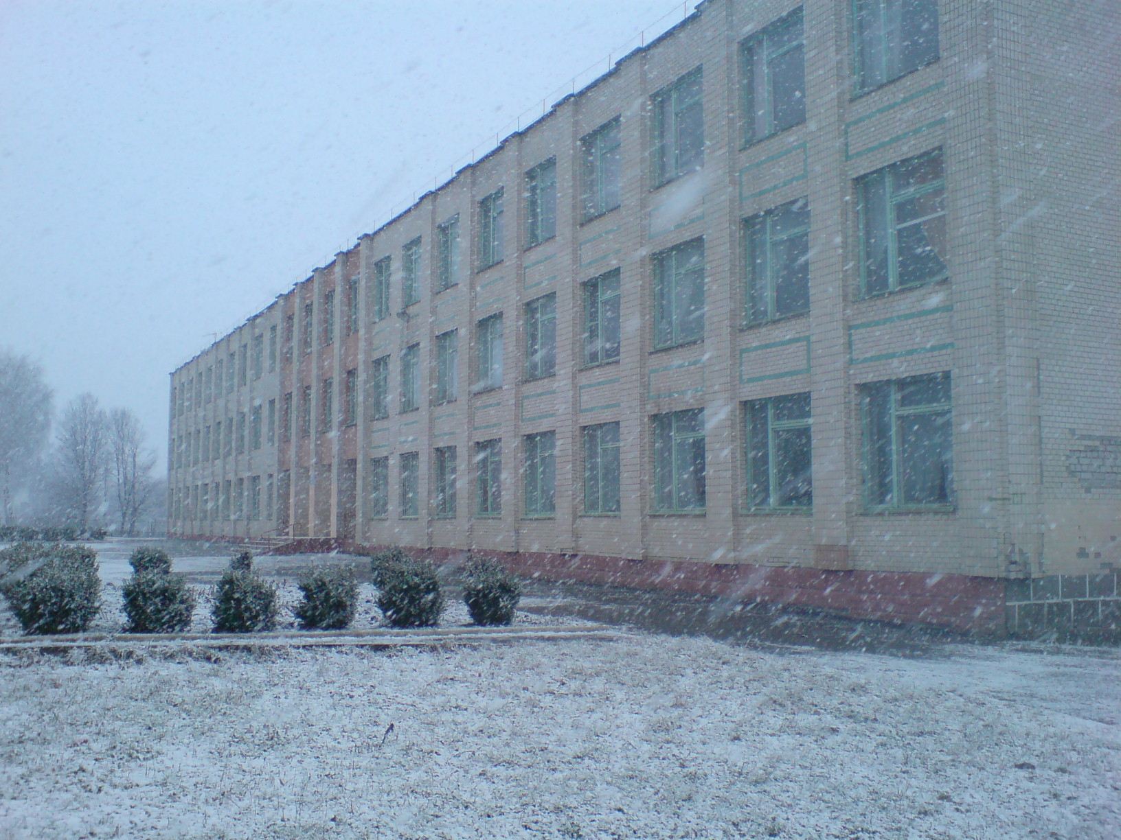 Красилівська ЗОШ №2 взимку